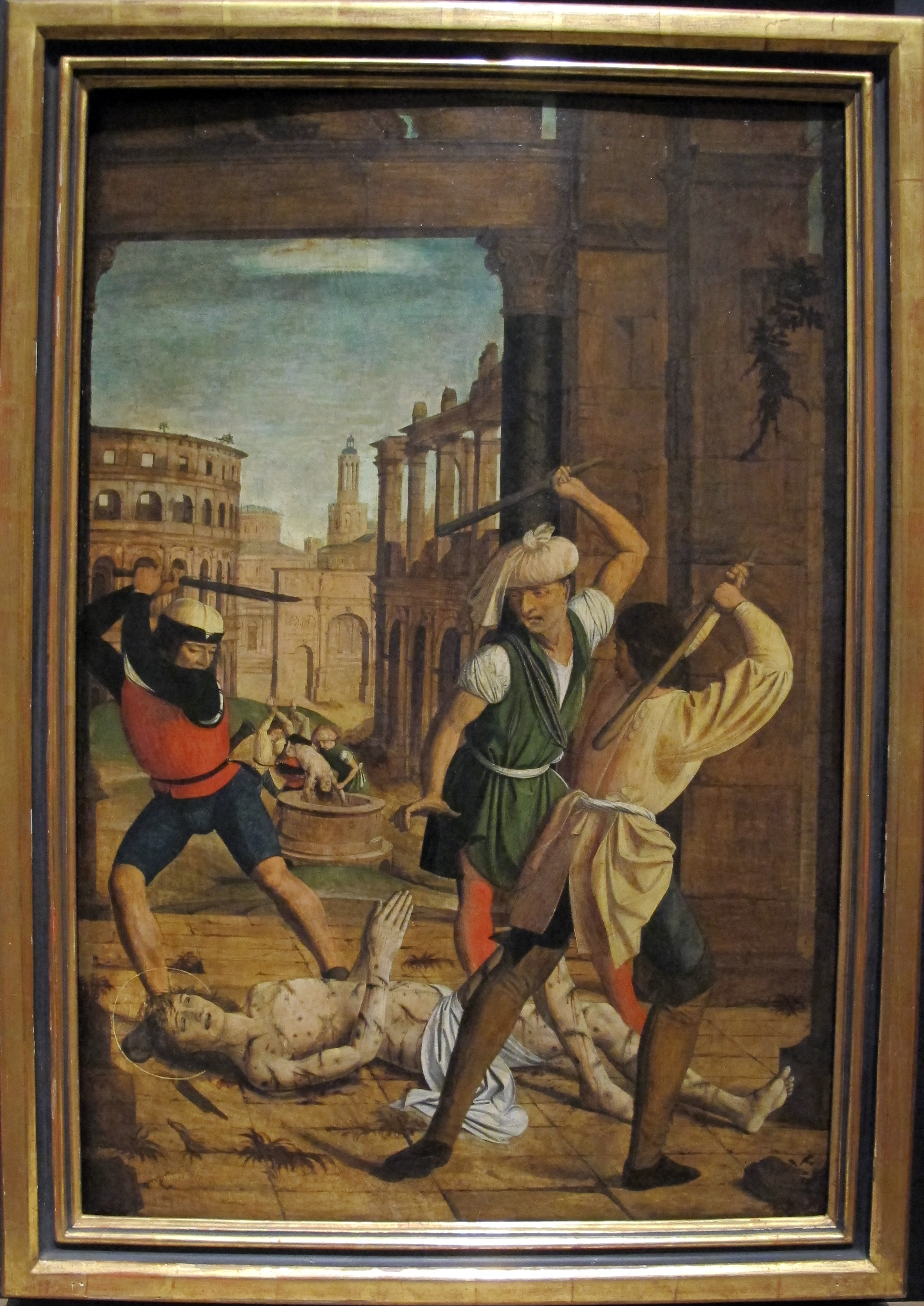 Philadelphia Museum of Art